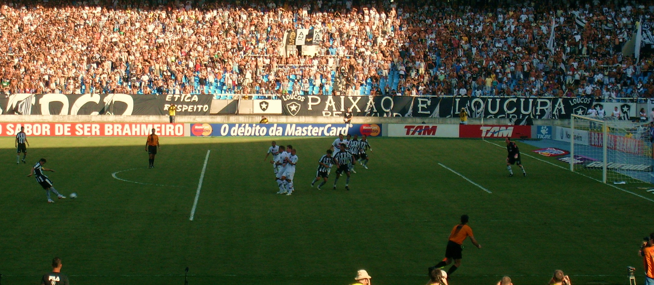 O zagueiro e capitão Juninho cobrando tiro livre indireto na partida Botafogo 3-2 São Paulo, no Engenhão.